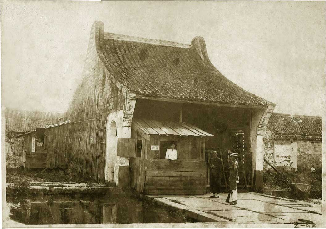 天一阁1933年重修时暂存书籍于范氏诒谷堂